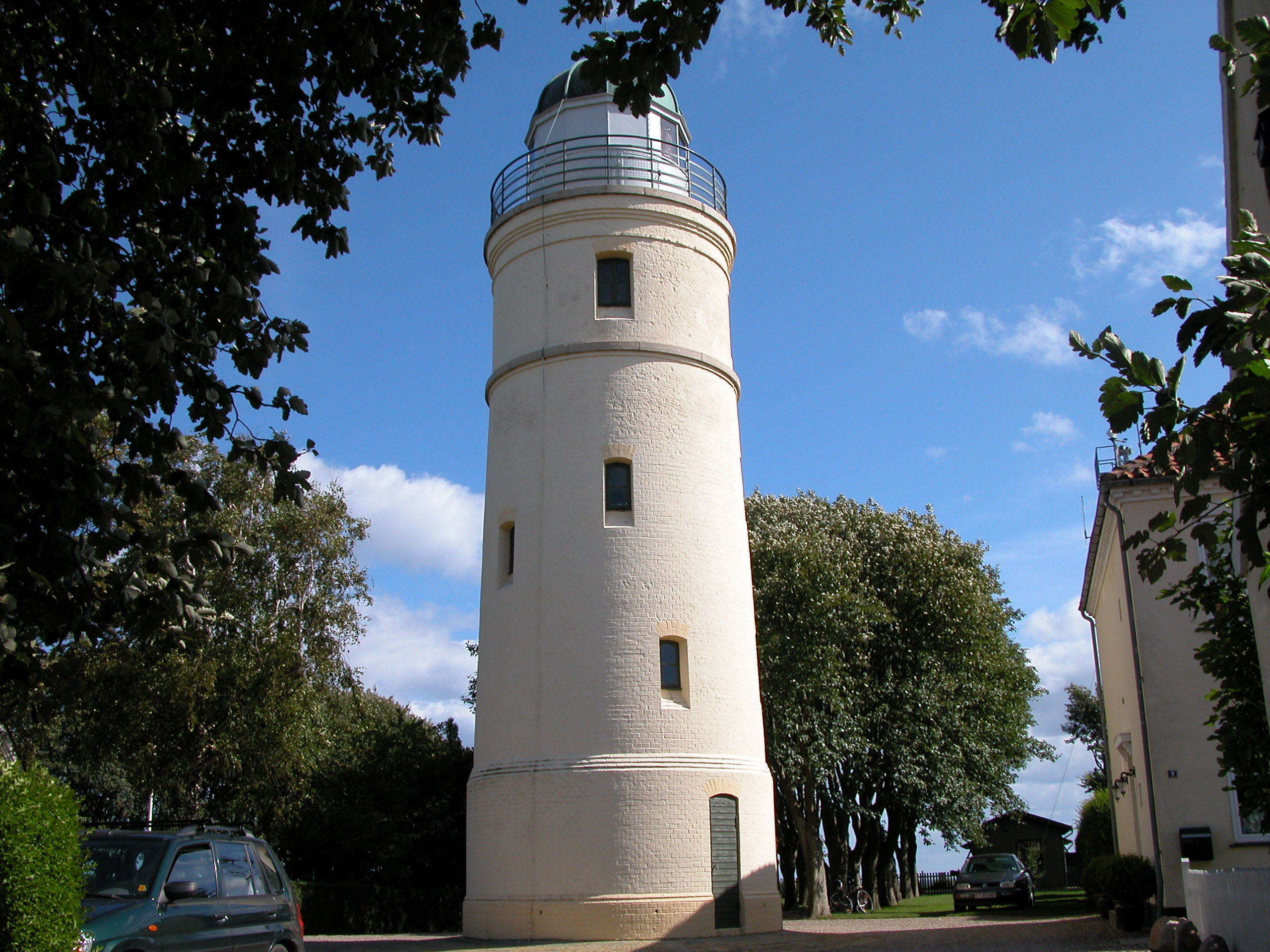 Lighthouse Kegnæs, Als, Denmark